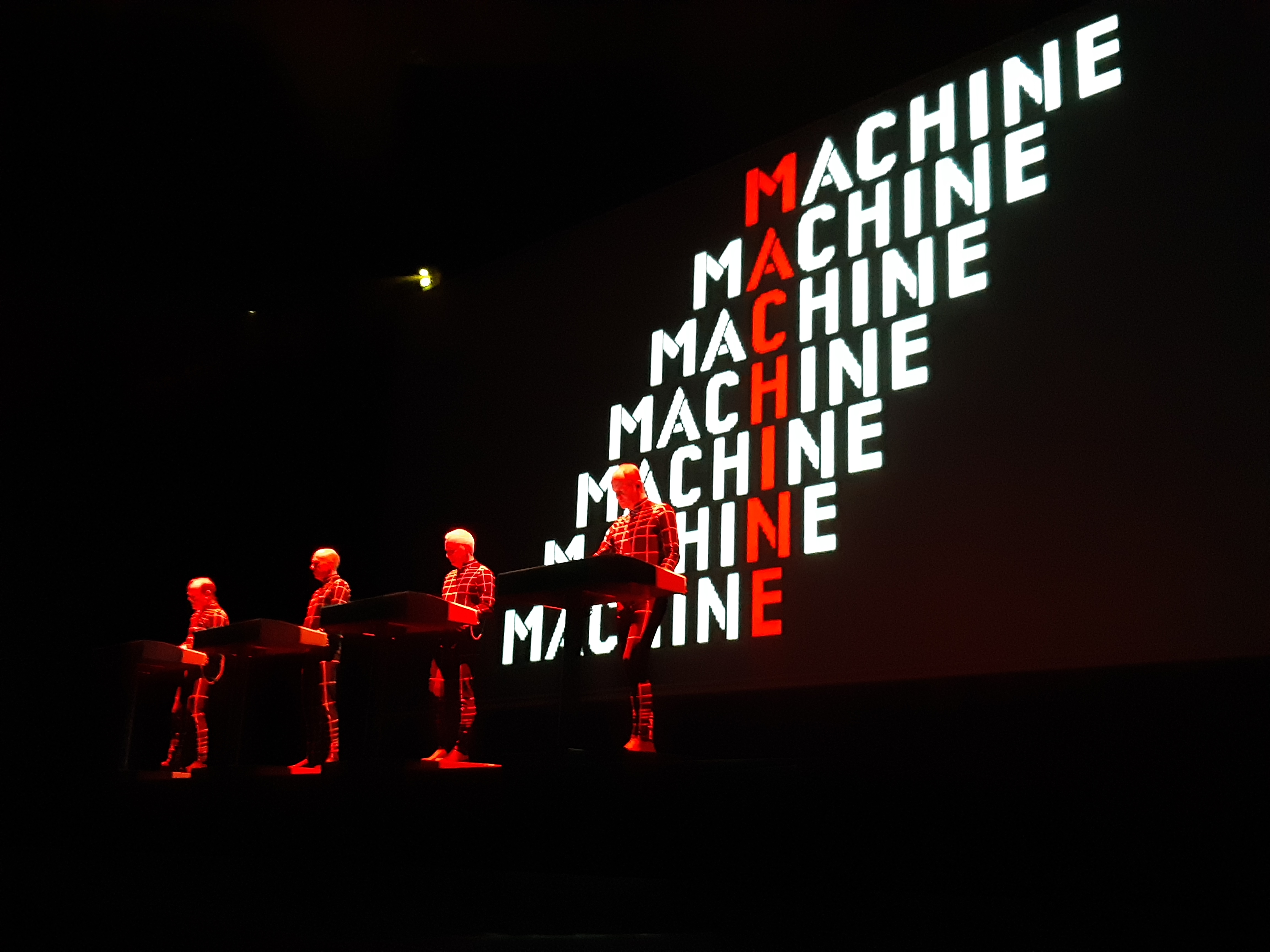 Kraftwerk en concert à la Philharmonie de Paris le 11 juillet 2019.